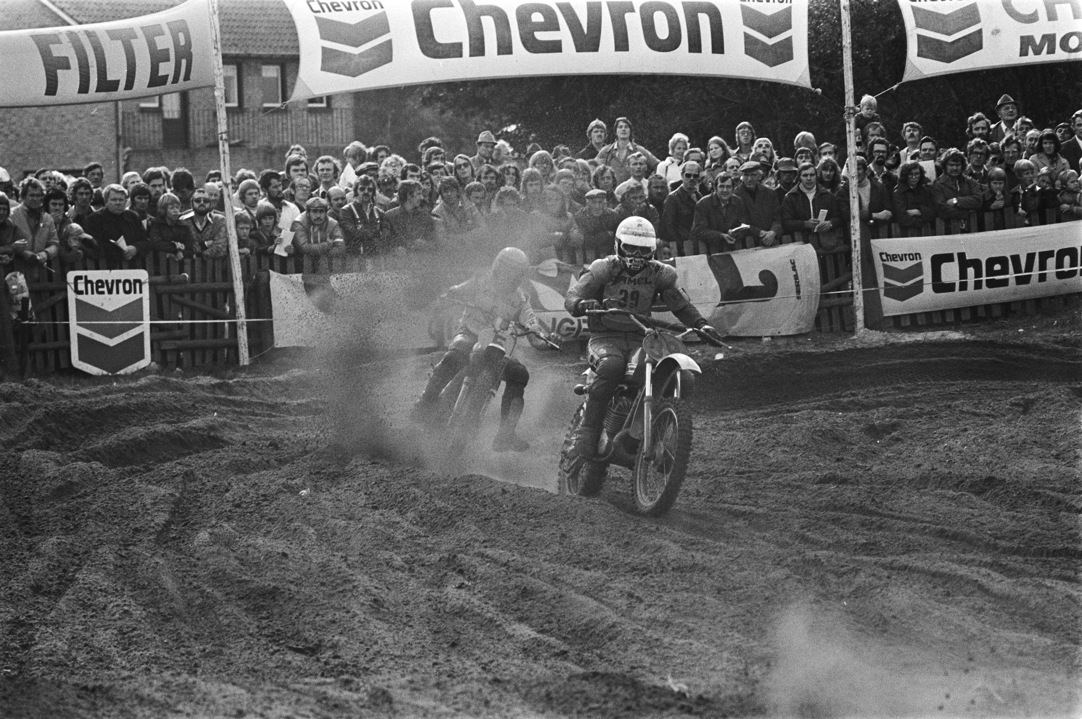 Collectie / Archief : Fotocollectie Anefo Reportage / Serie : [ onbekend ] Beschrijving : GP des Nations te Sint Anthonis , Moiseev (USSR) met achter hem Roger de Coster Datum : 11 september 1976 Trefwoorden : motoren Fotograaf : Peters, Hans / Anefo Auteursrechthebbende : Nationaal Archief Materiaalsoort : Negatief (zwart/wit) Nummer archiefinventaris : bekijk toegang 2.24.01.05 Bestanddeelnummer : 928-7780